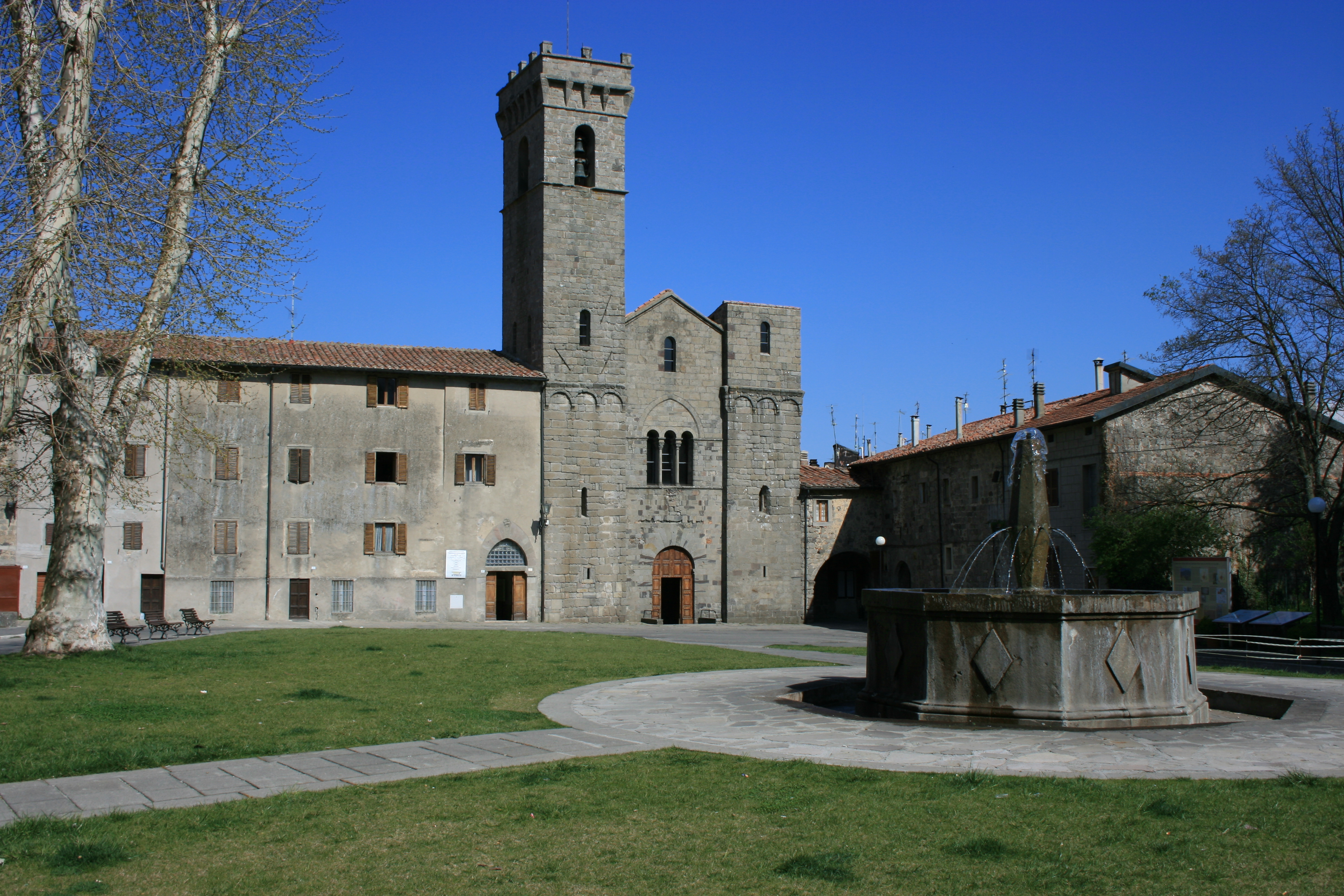 Abbazia di san Salvatore (Abbadia San Salvatore-Siena, Italy)